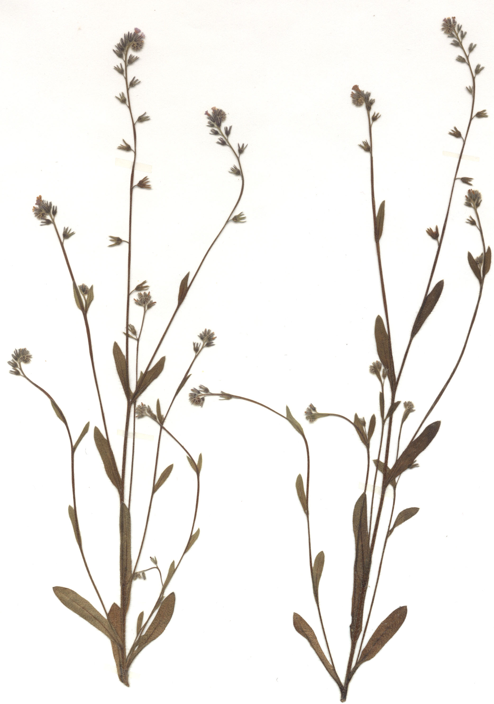 Myosotis discolor, eigener Herbarbeleg von 1983, Unterfranken